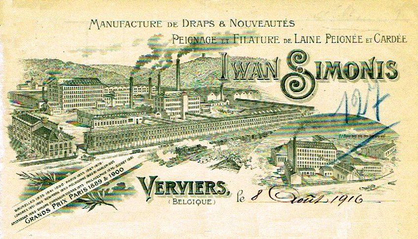 Dessin de la filature de laine Iwan Simonis à Verviers, fin XiXe